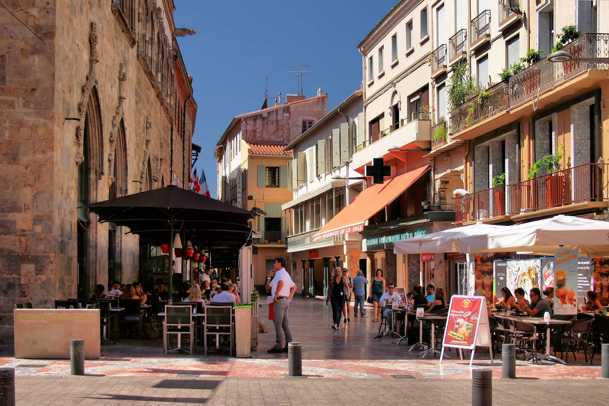 Perpignan